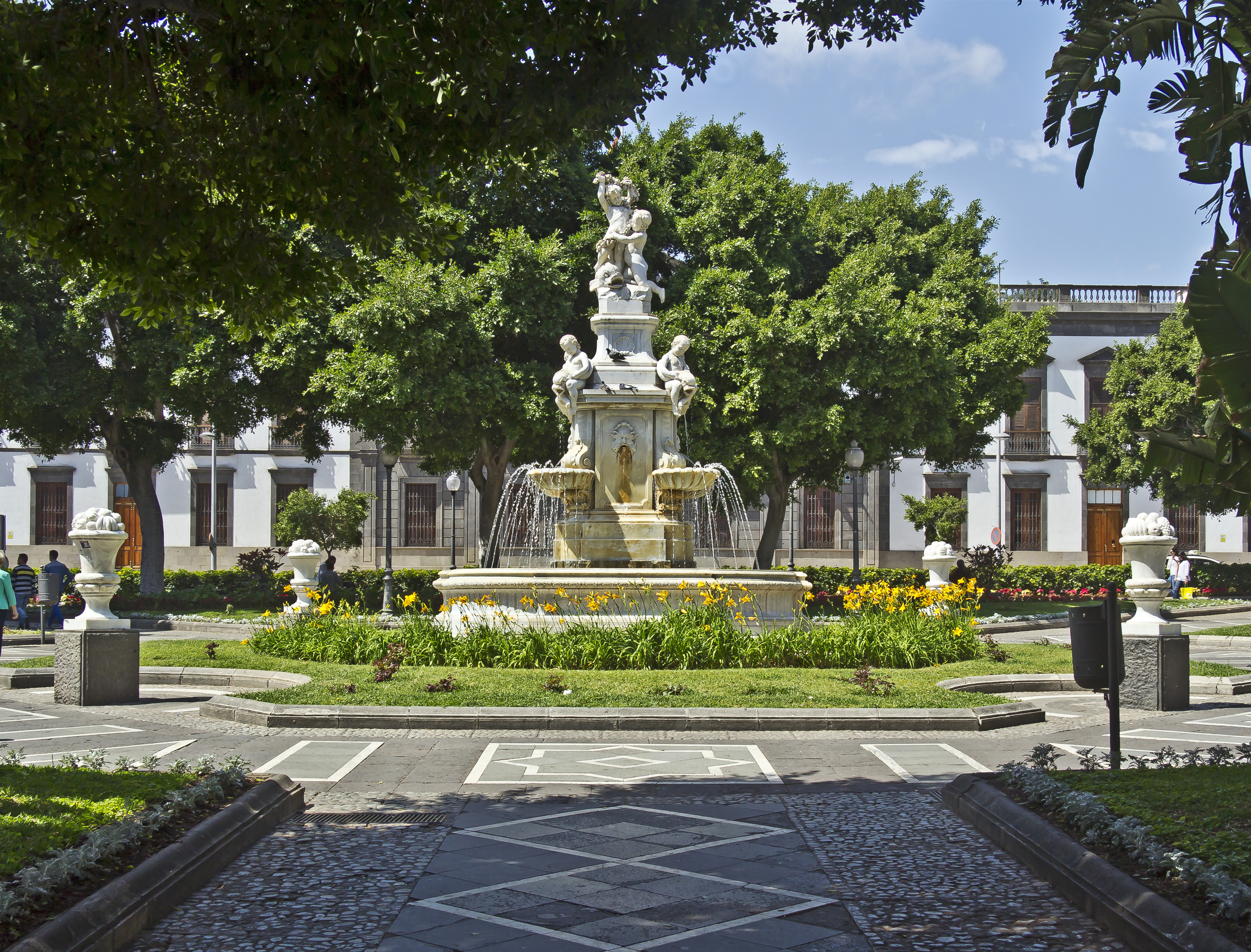 Die Plaza del General Weyler in Santa Cruz de Tenerife wurde im Jahr 1893 als Parkanlage angelegt. Der Brunnen wurde von Vincente Armiñon entworfen und im Jahr 1893 fertiggestellt.